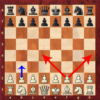 Esta imagen muestra las dos posibles alternativas de movimiento inicial de un peón berolina (en rojo), y su única alternativa de captura (en azul). Puede iniciar su salida con una o dos casillas, pero luego de ahi solo puede moverse a una casilla en diagonal por vez.